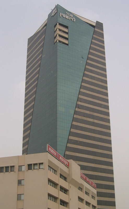 Levinstein Tower, Tel Aviv